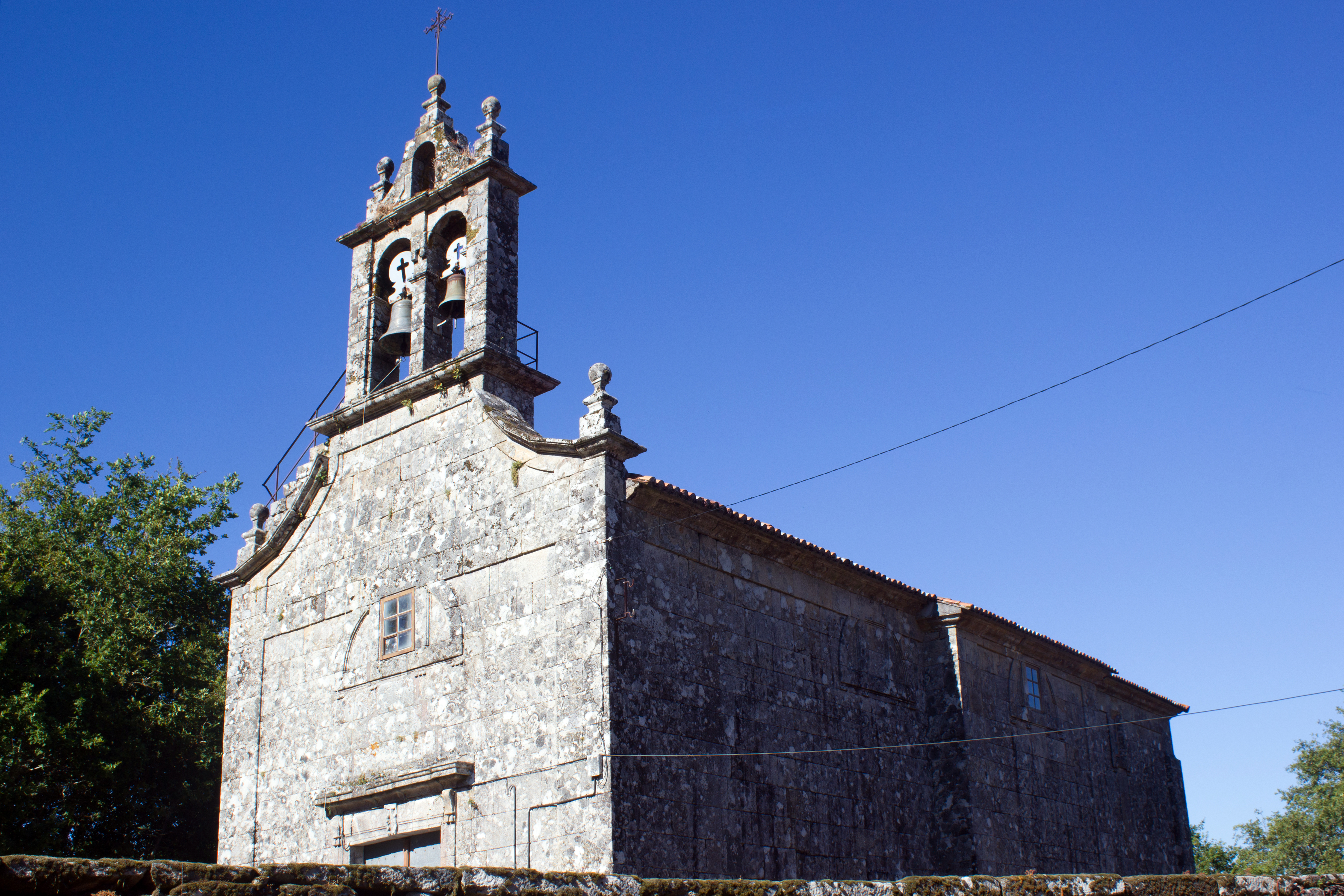 Igrexa de Santo André de Souto, no concello da Estrada.